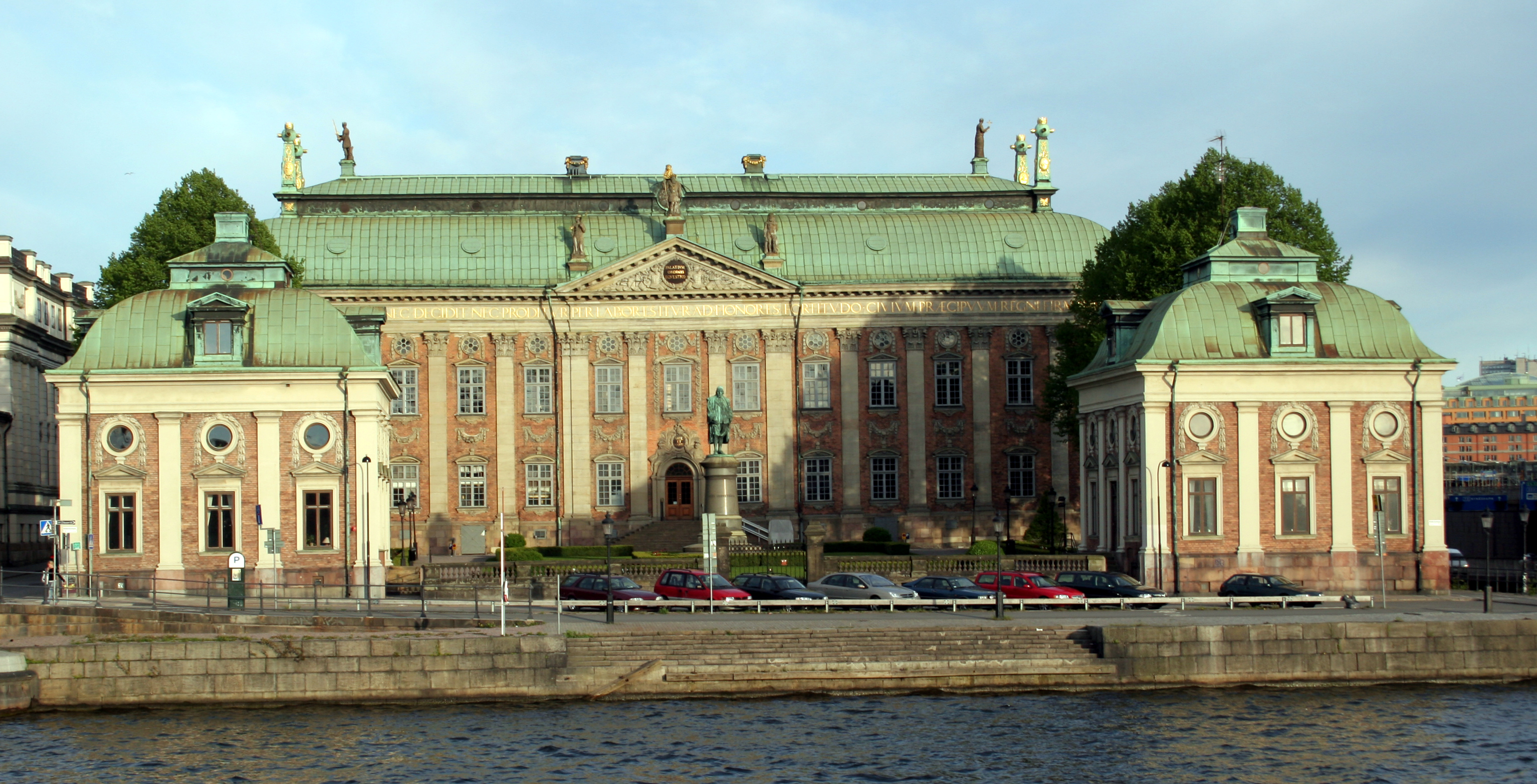 Riddarhuset, Gamla stan, Stockholm, Sweden